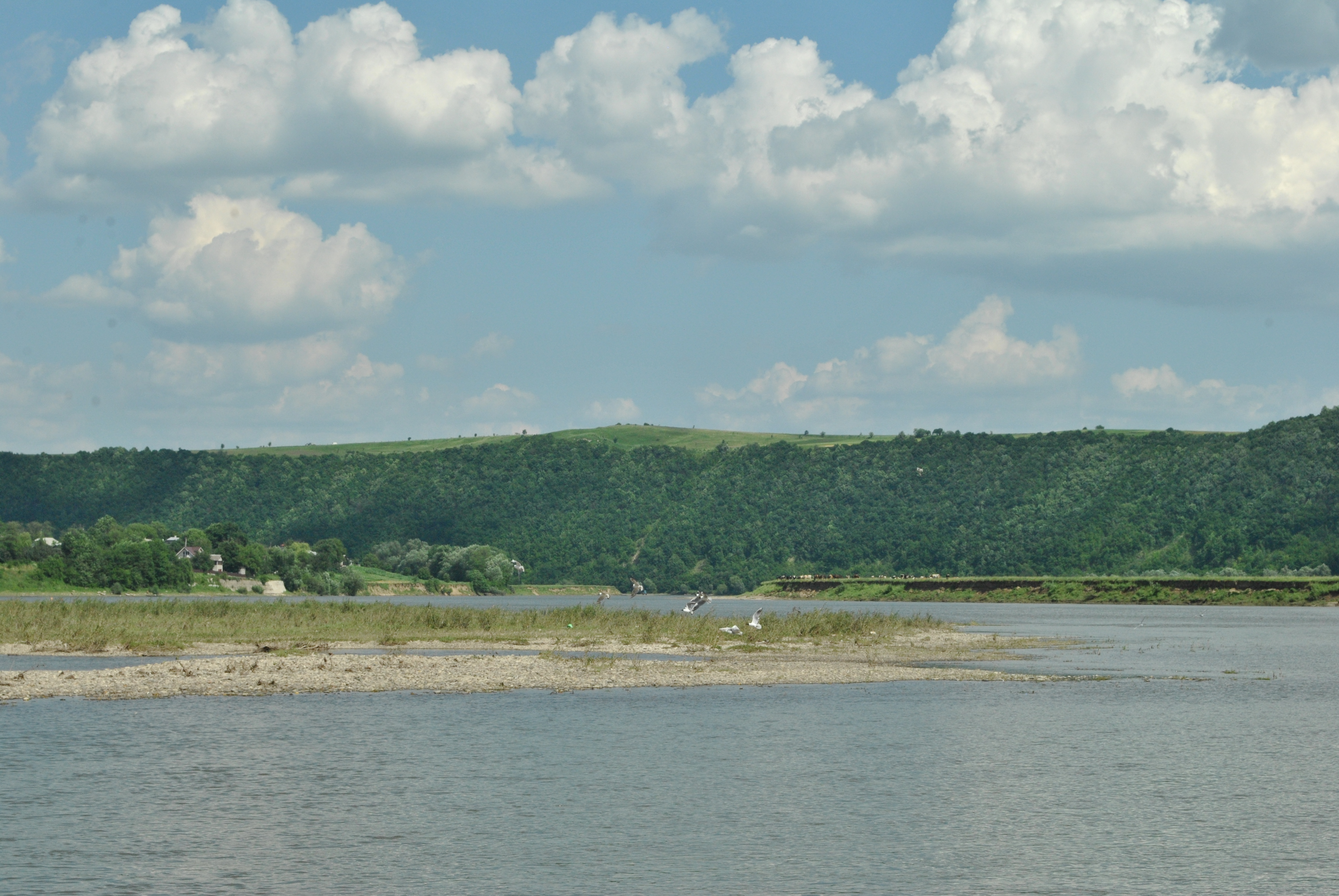 «Дністровський каньйон» у Монастириському районі Тернопільської області поблизу с. с. Горигляди.